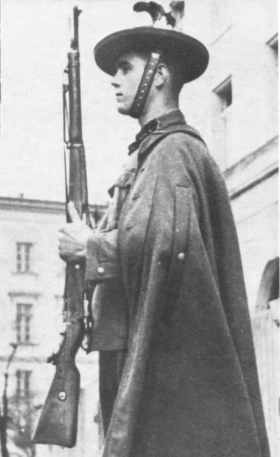 Szeregowy z 49 Huculskiego Pułku Strzelców w czasie uroczystej warty w Warszawie w roku 1937. Uzbrojony w karabin wz. 1898a Mauser